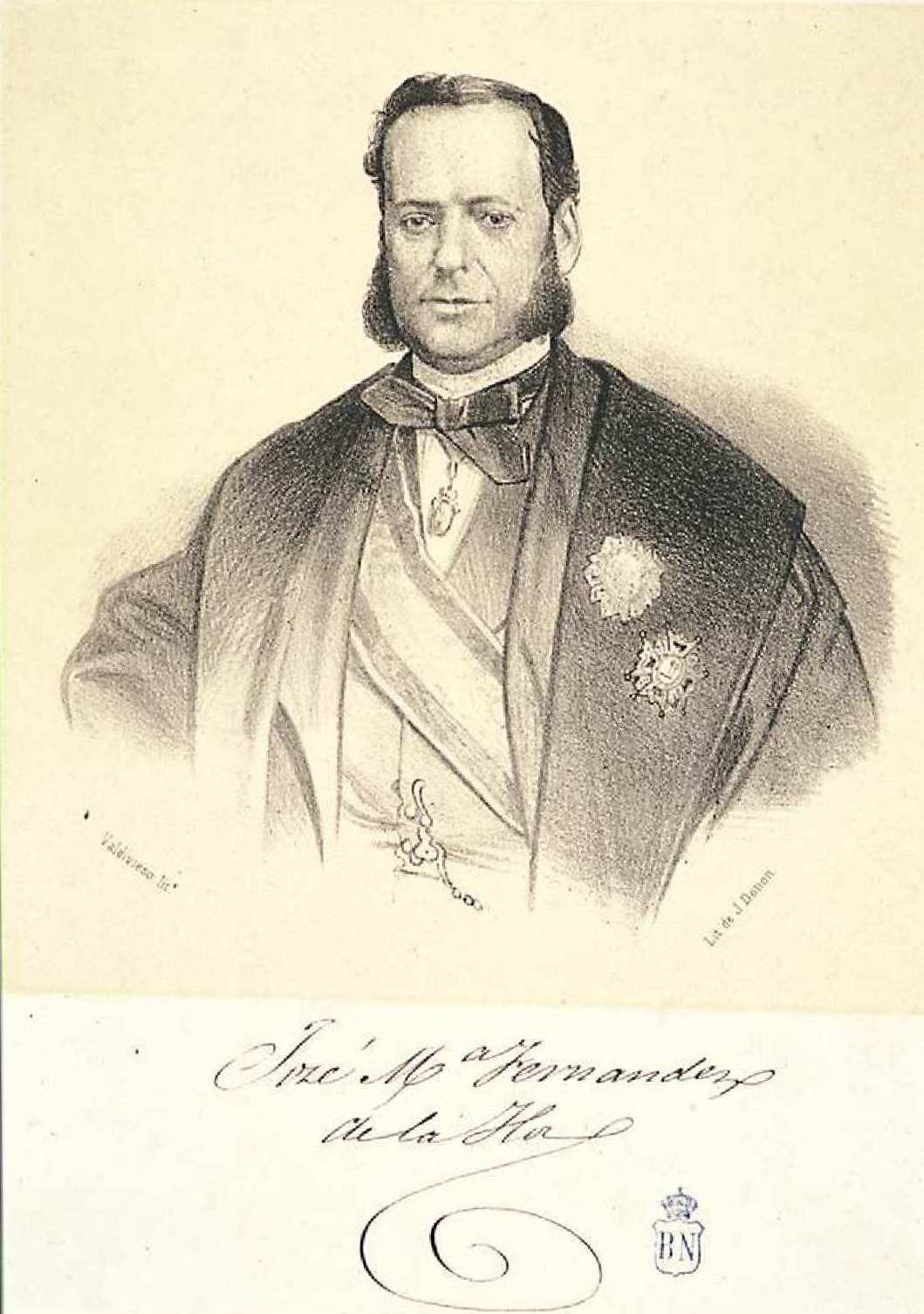 Retrato de José María Fernández de la Hoz. Litografía de Domingo Valdivieso y Henarejos. Biblioteca Nacional de España.